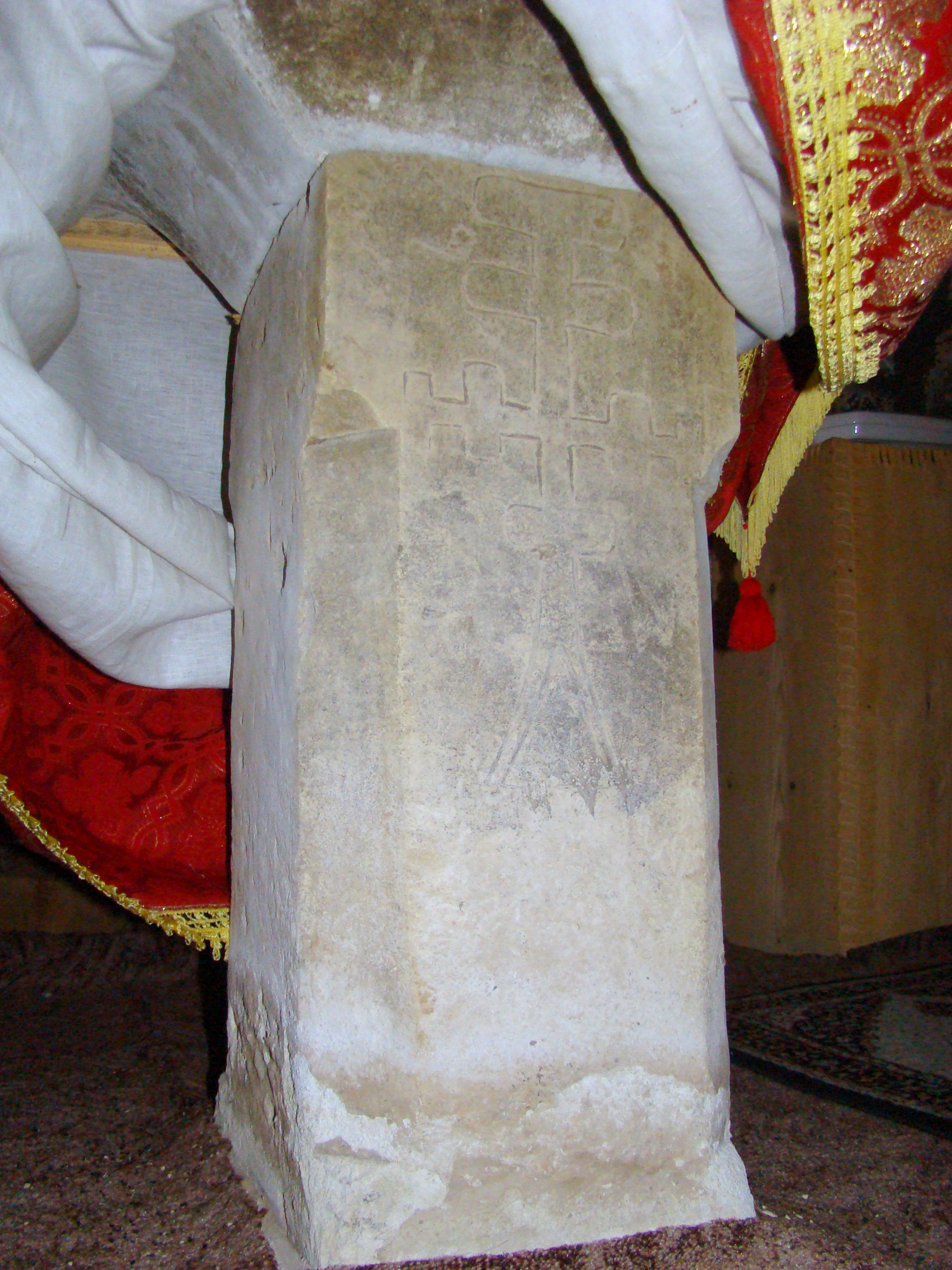 Biserica de lemn "Adormirea Maicii Domnului" a mănăstirii Bic, strămutată din satul Stâna